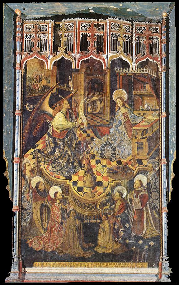 La obra representa la Anunciación a la Virgen María junto con un grupo de santos y donantes. Esta obra le fue encargada al pintor Pedro de Córdoba por el canónigo Diego Sánchez de Castro, y fue terminada el día 20 de marzo de 1475, según consta consta en una inscripción localizada en la tabla que está aoompañada por la firma del autor.